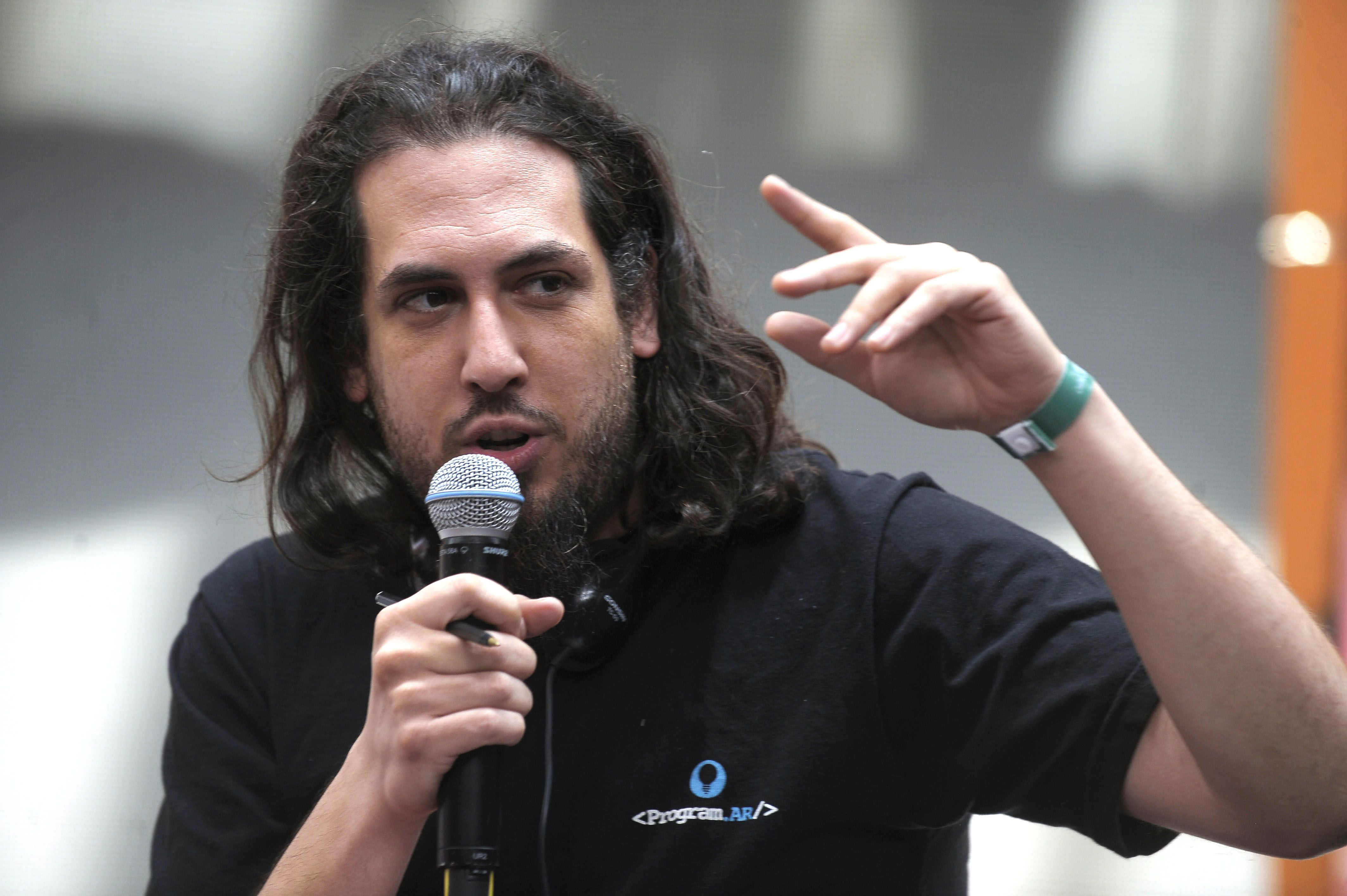 Rio de Janeiro - O tema Internet como Espaço Público é debatido no encontro global Emergências, na Fundição Progresso, centro da cidade